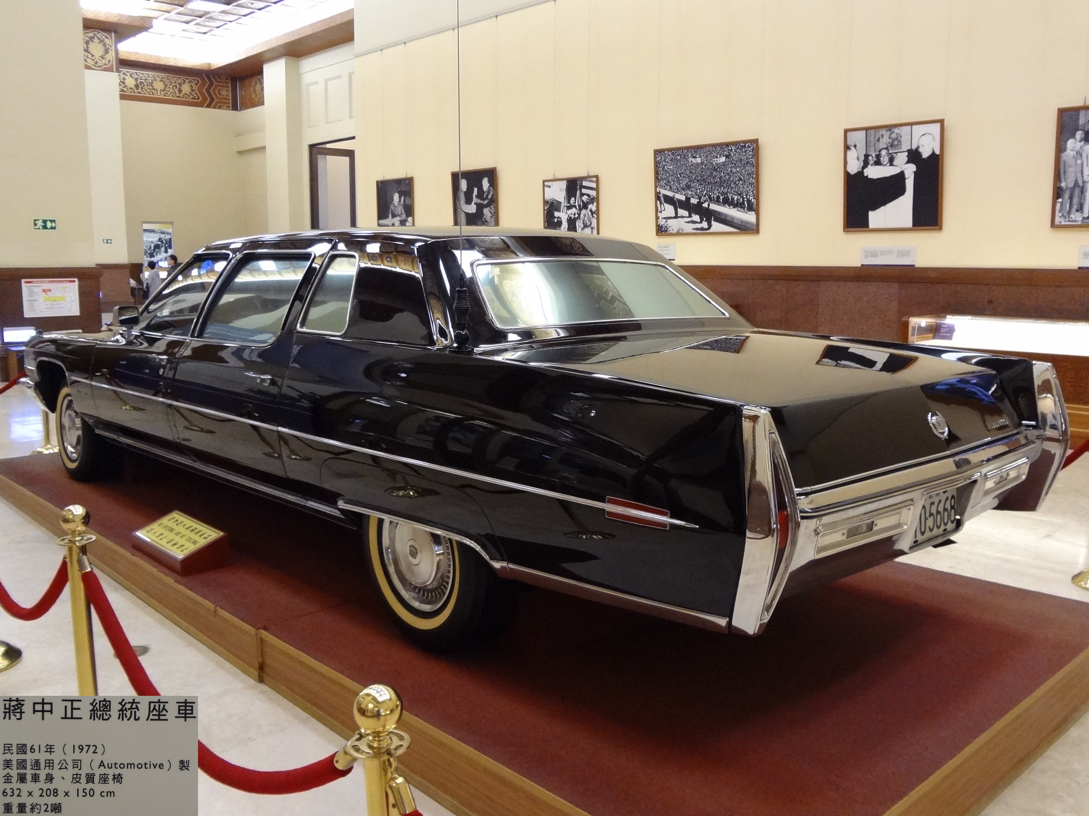 國立中正紀念堂展示的1972年蔣中正總統座車。